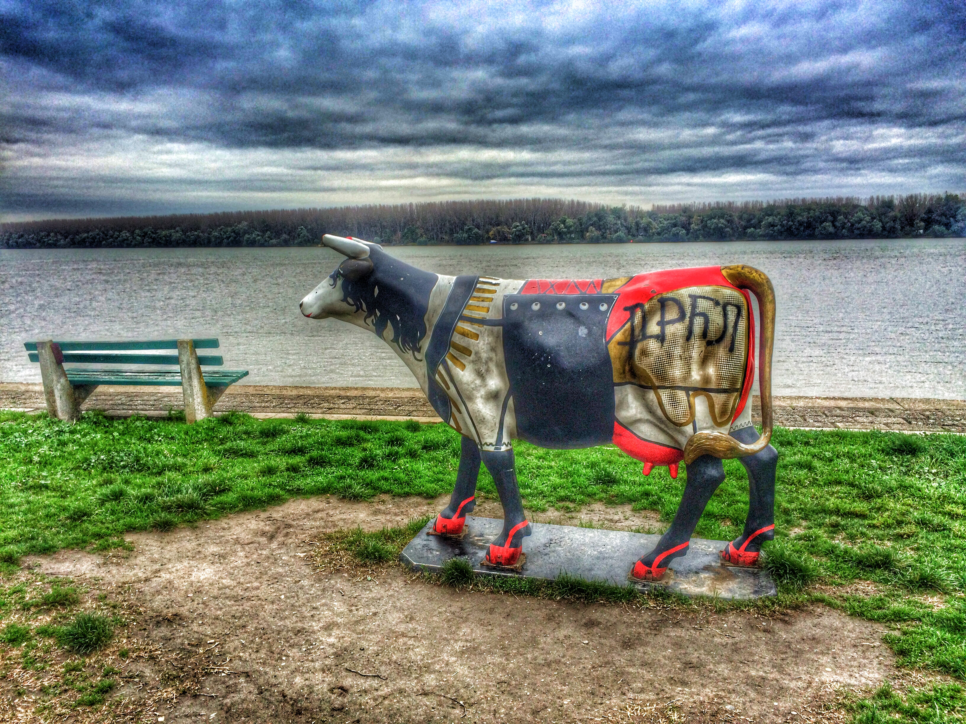 Dunavski kej